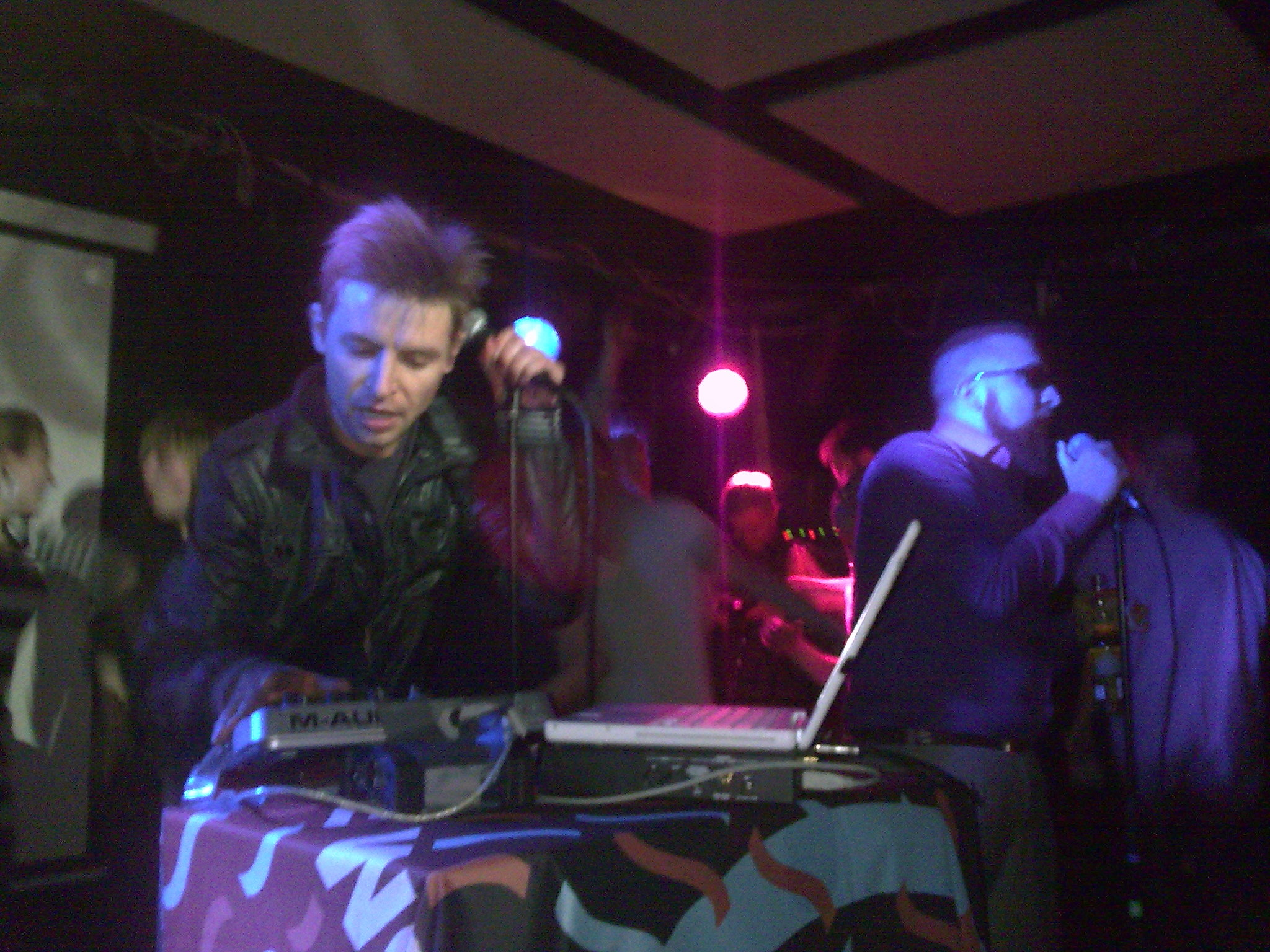 The Wong Boys koncert.